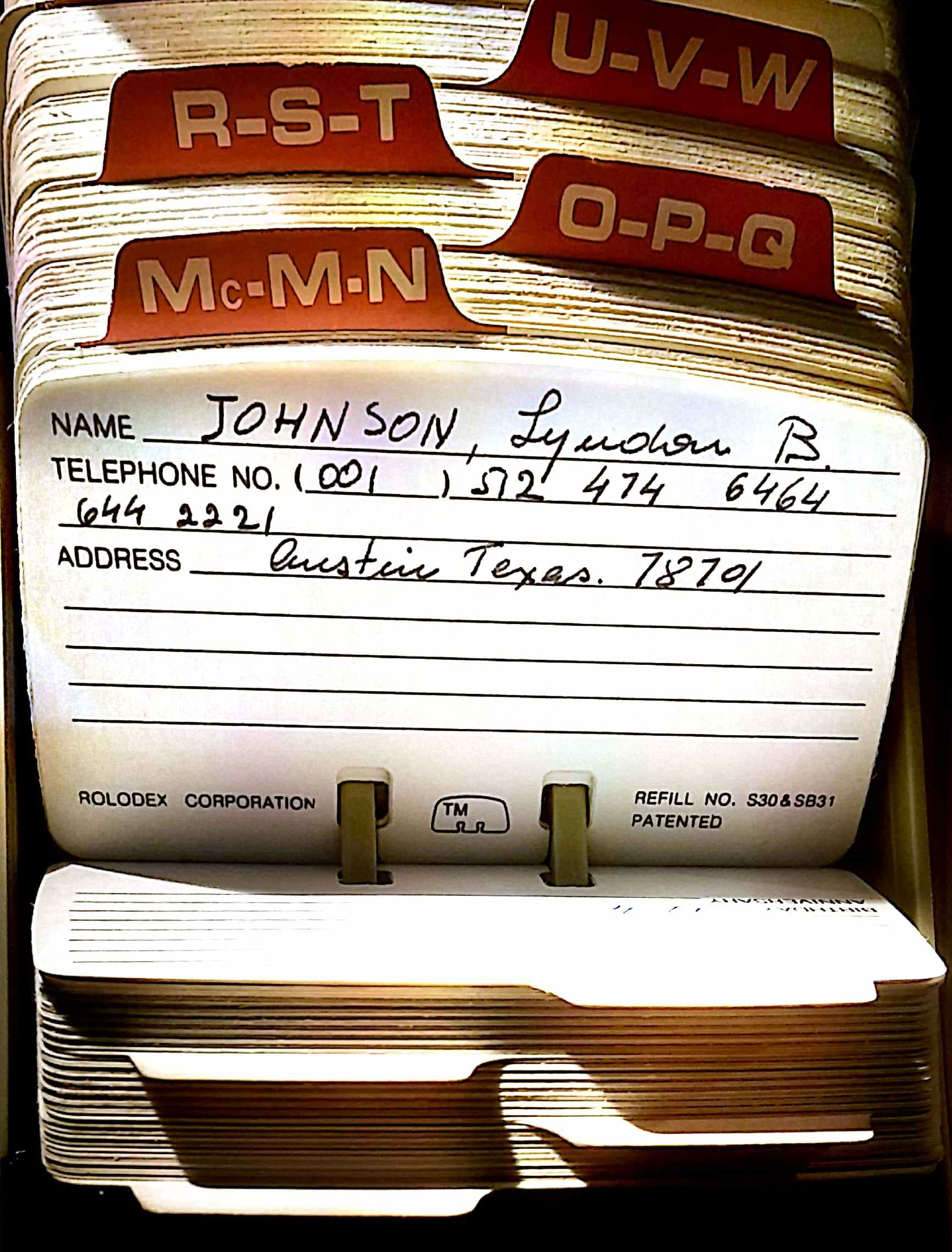 ספר הטלפונים של לוי אשכול, הדף עם פרטים של הנשיא ג'ונסון